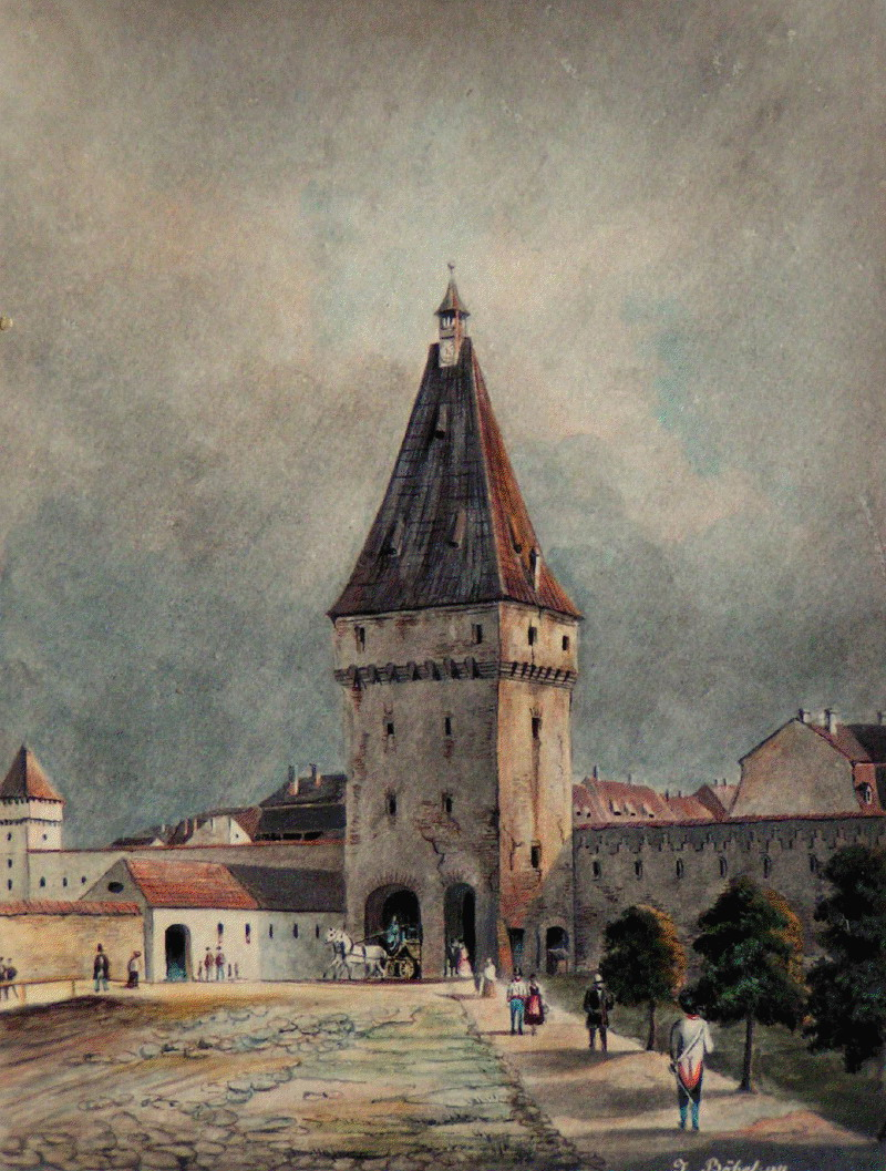 Johann Böbel (1824-1887) - Pictură în acuarelă a Turnului Porții Cisnădiei